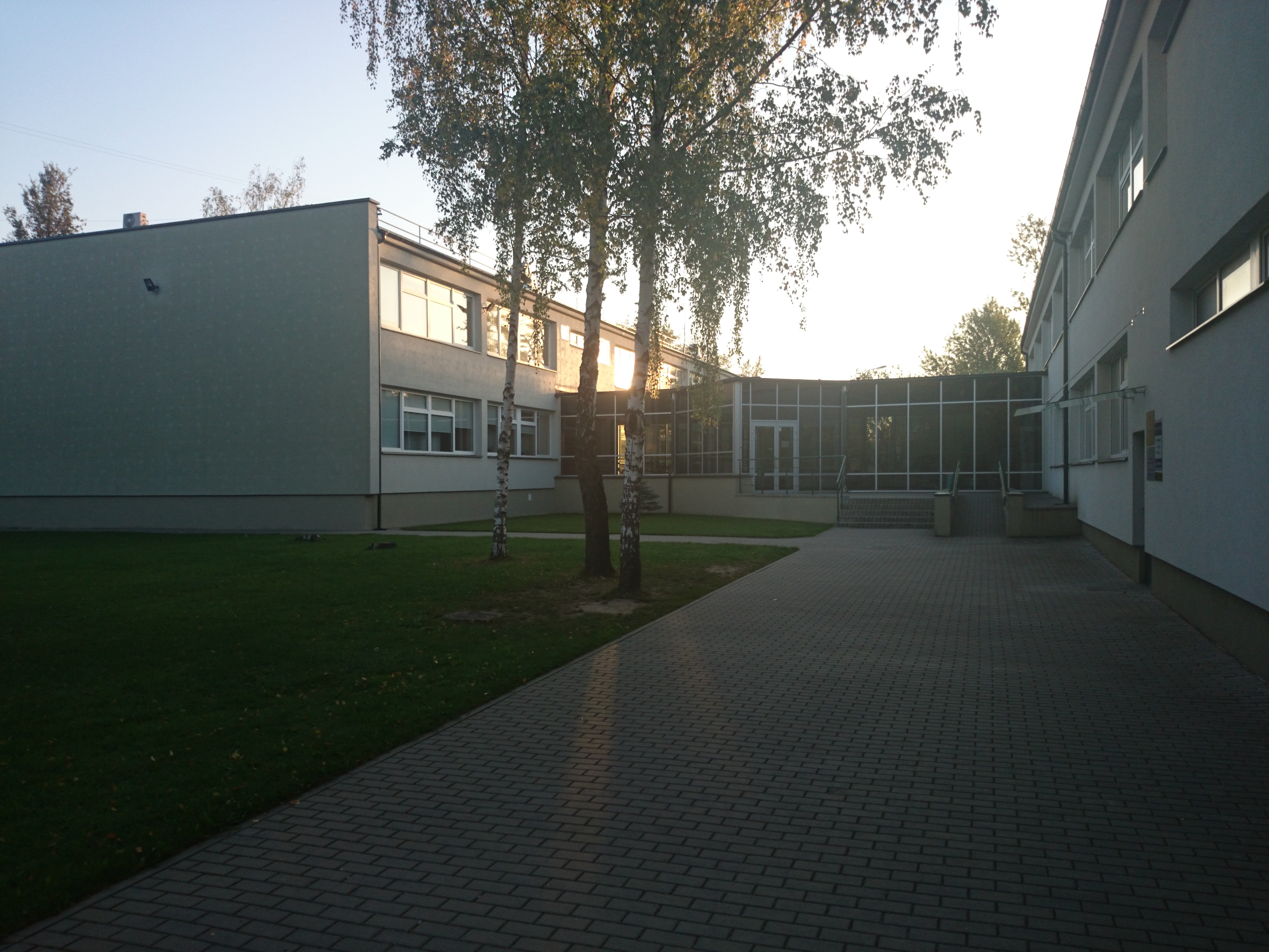 Achemos mokymo centras